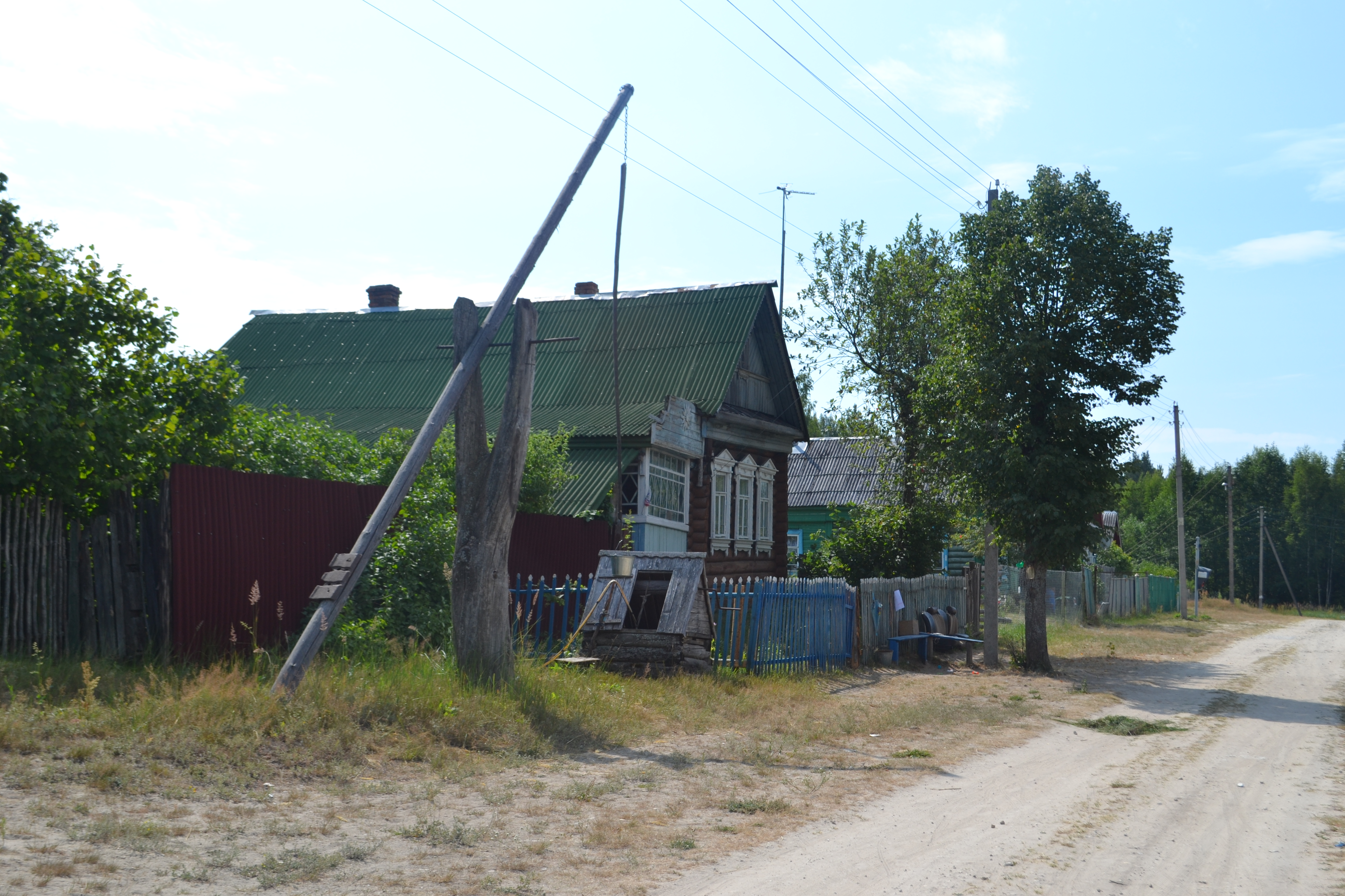 Общественный колодец в деревне Пруды (Шатурский район)